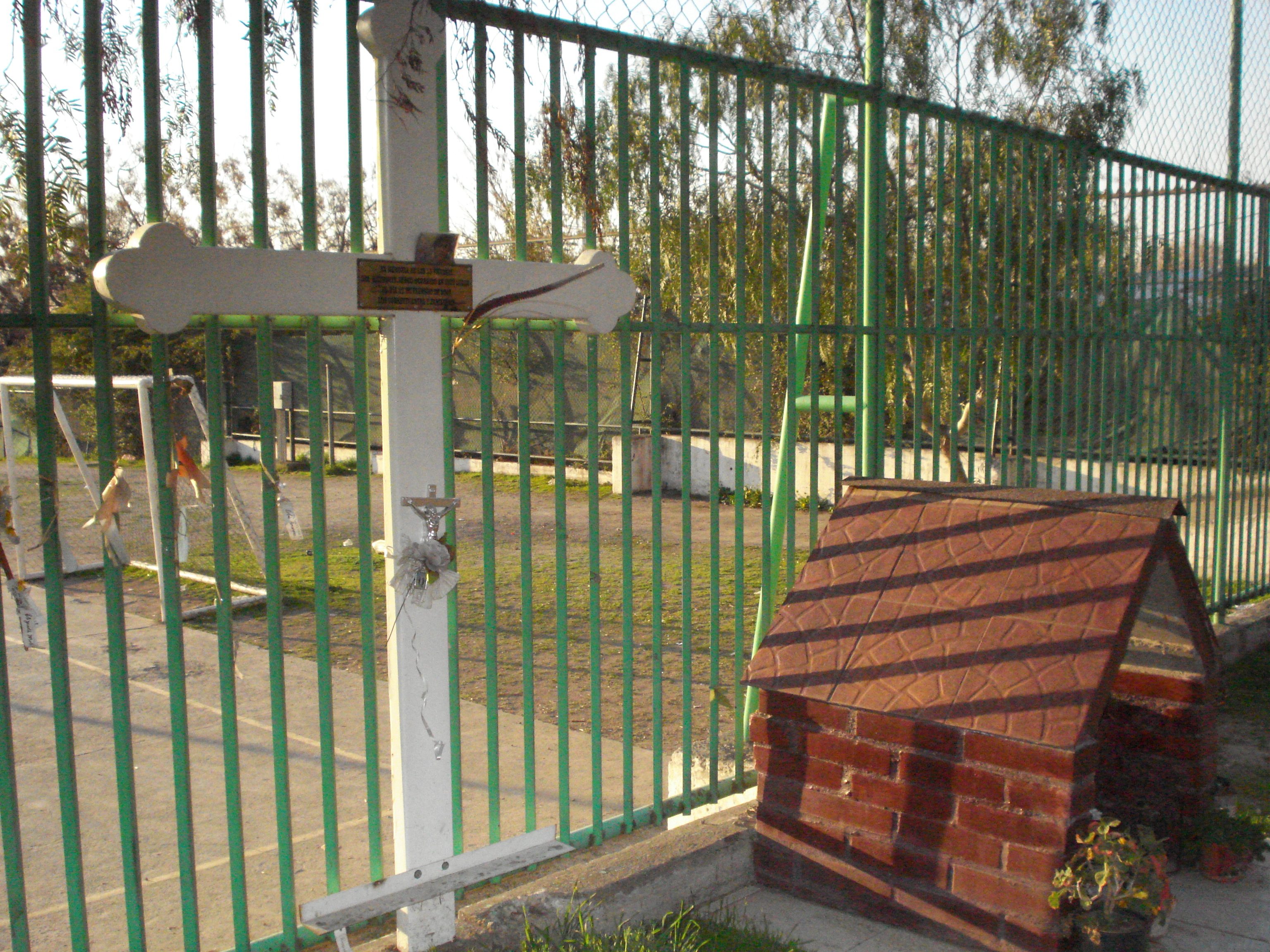 Animita que recuerda la tragedia aérea en Peñalolén fue un accidente aéreo ocurrido en Chile el 27 de febrero de 2008, en donde una avioneta Cessna 210 de instrucción de Carabineros de Chile cayó sobre una multicancha de la comuna de Peñalolén, dejando un saldo de 13 personas muertas y una decena de heridos